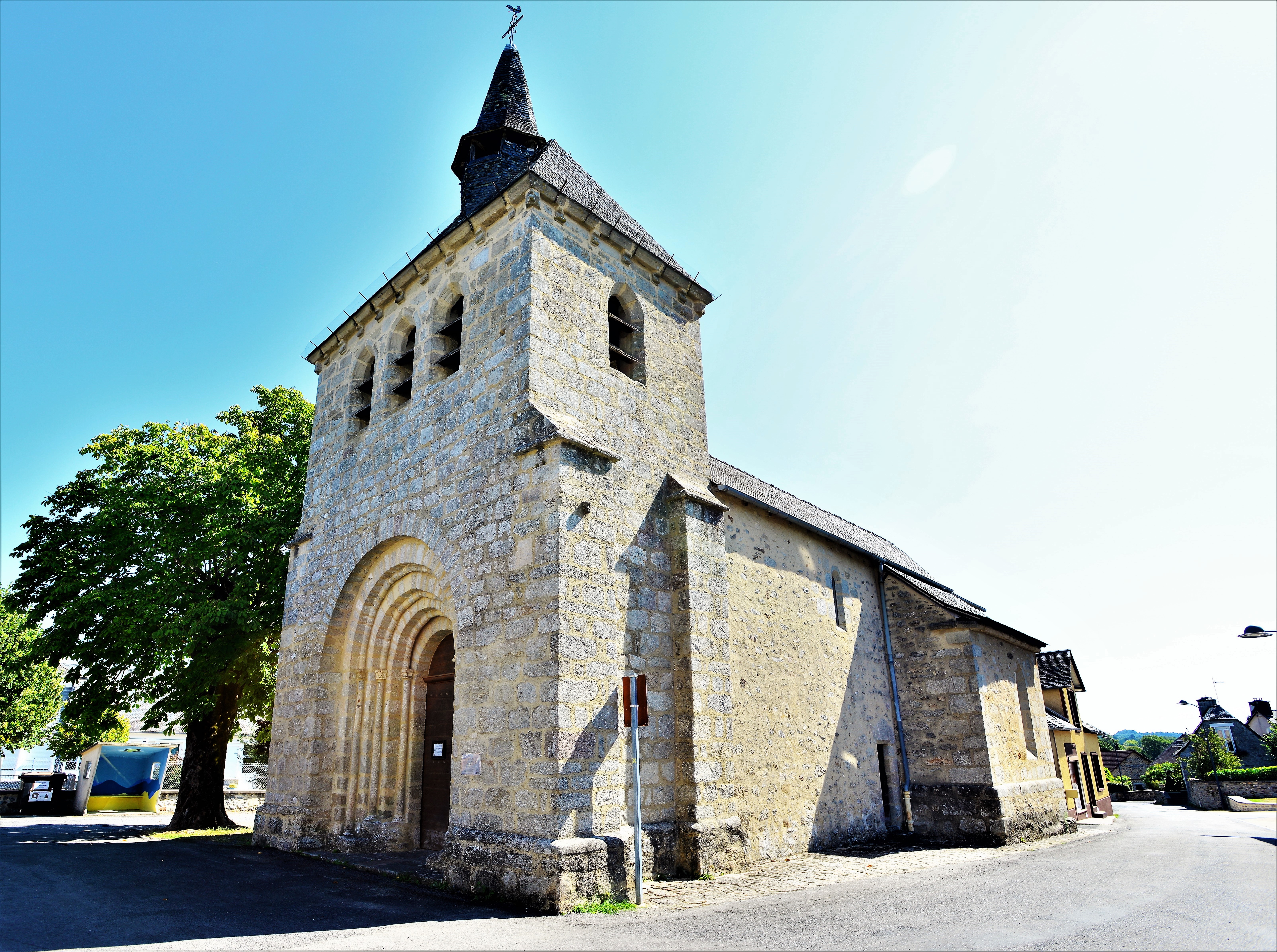 Chanteix, l'église, Corrèze, France.